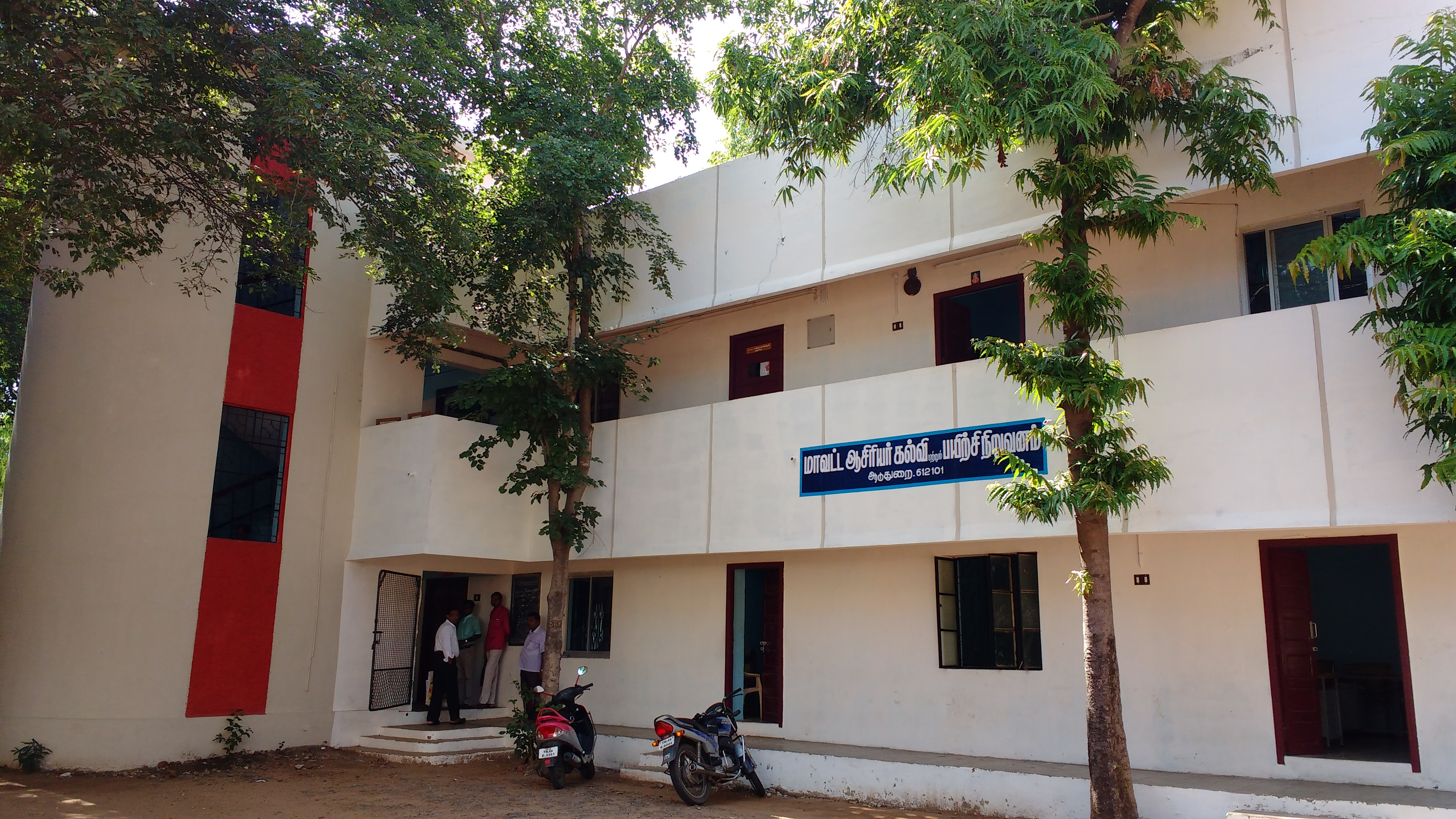 ஆடுதுறை மாவட்ட ஆசிரியர் கல்வி மற்றும் பயிற்சி நிறுவனத்தின் முகப்பு